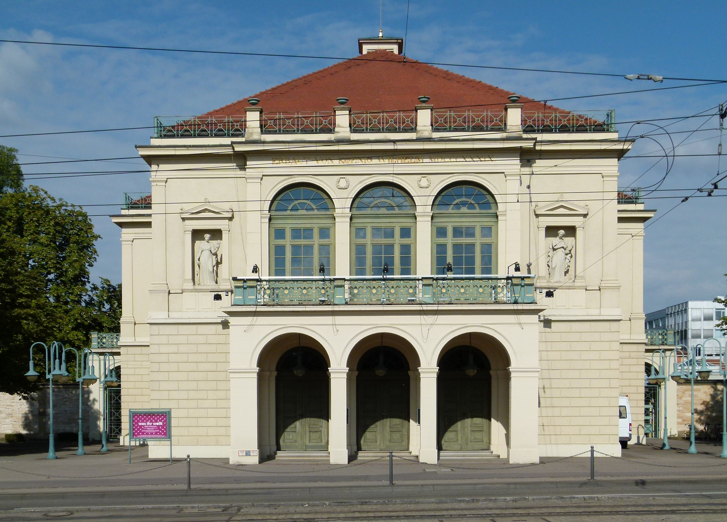 Denkmalgeschütztes Wilhelma-Theater, Bad Cannstatt, Stuttgart